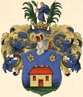 Tritthoffi suguvõsa aadlivapp